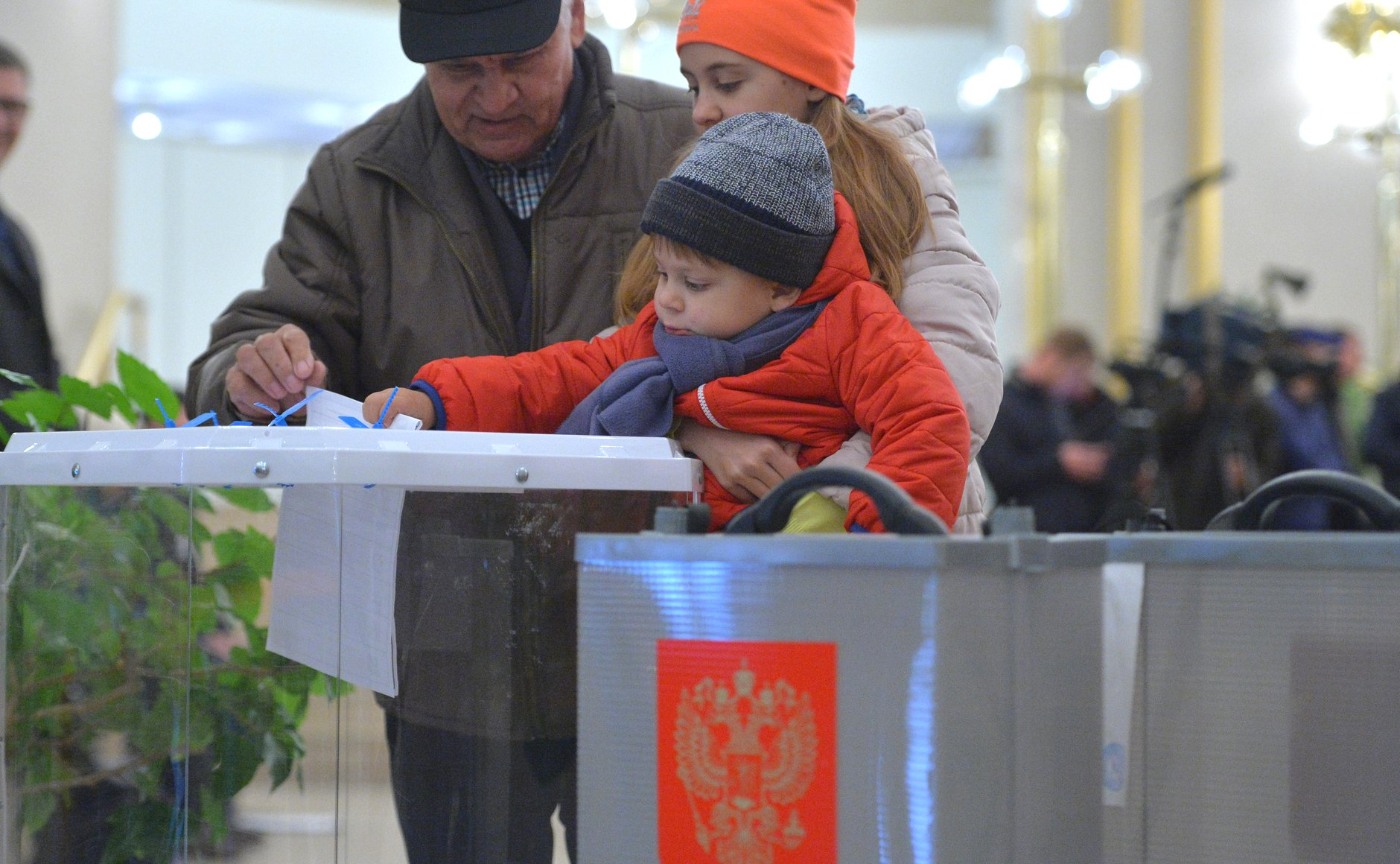 Голосование на избирательном участке №2151 в Москве